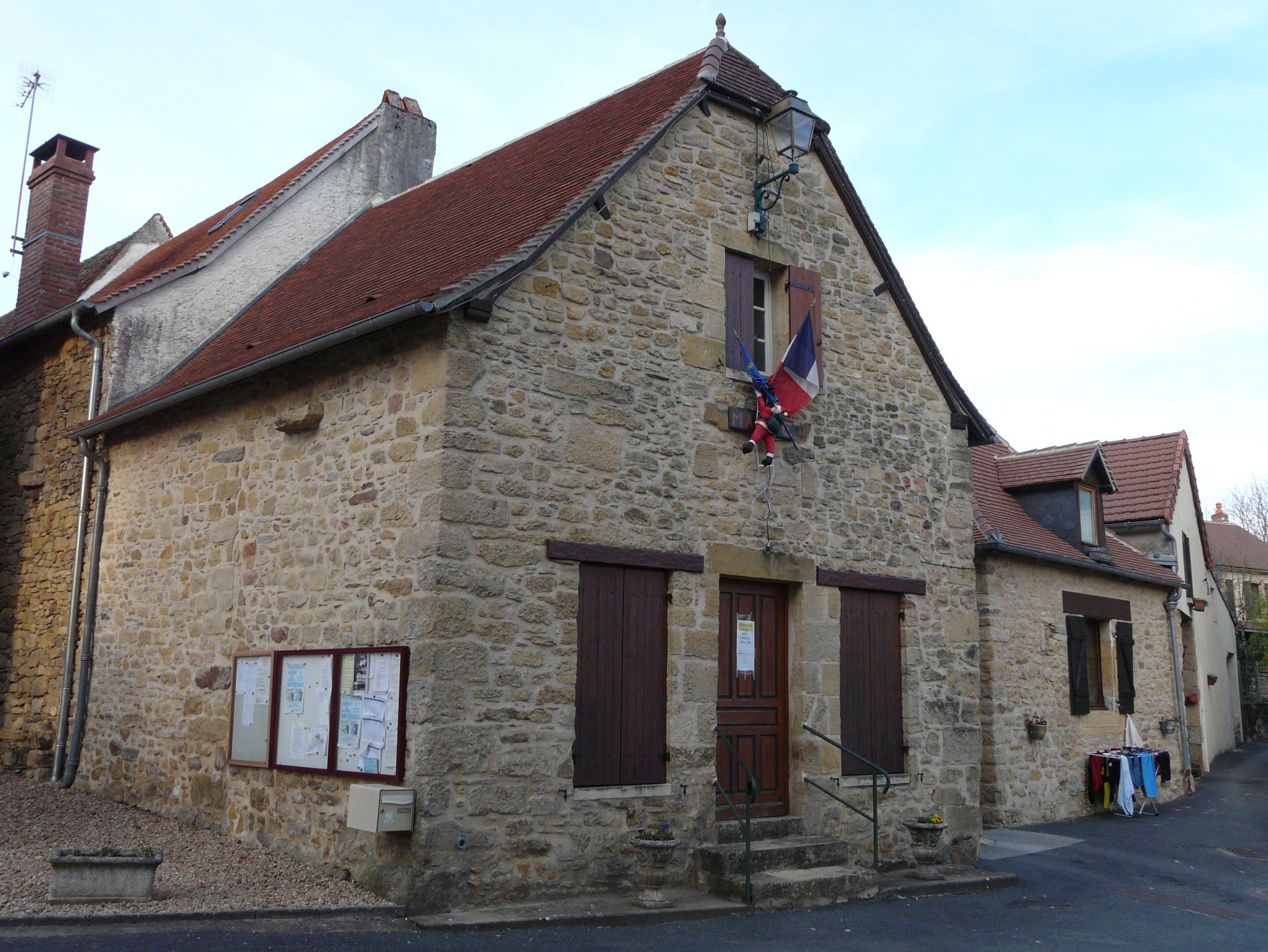 La mairie de Preyssac-d'Excideuil vu depuis le sud, Dordogne, France.